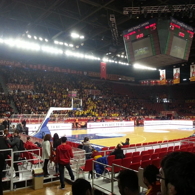 Abdi İpekçi Arena'nın içi.